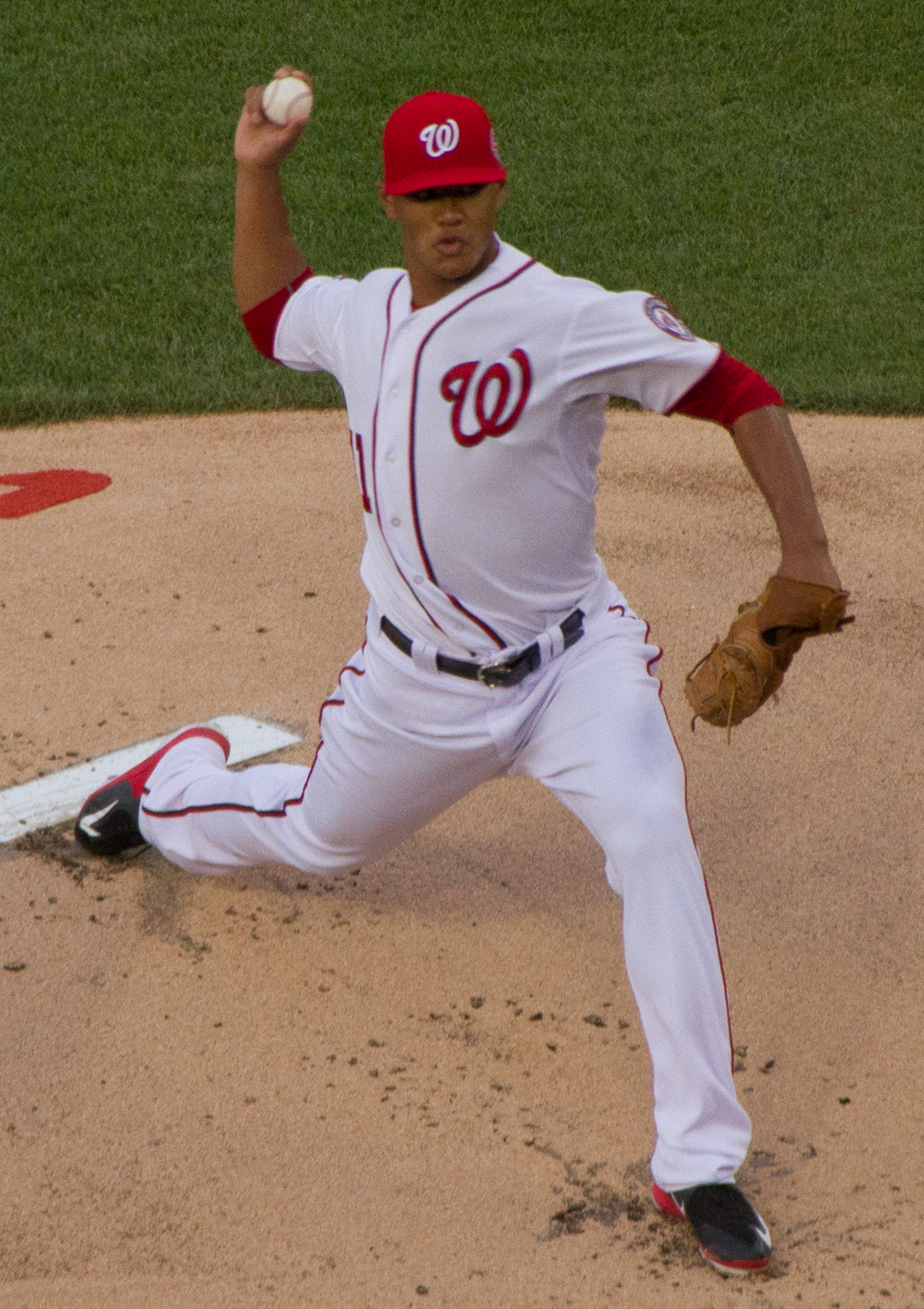 Joe Ross